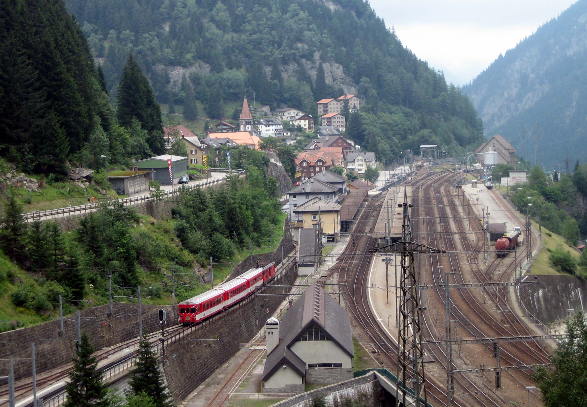 Blick auf Göschenen mit Bahnhof